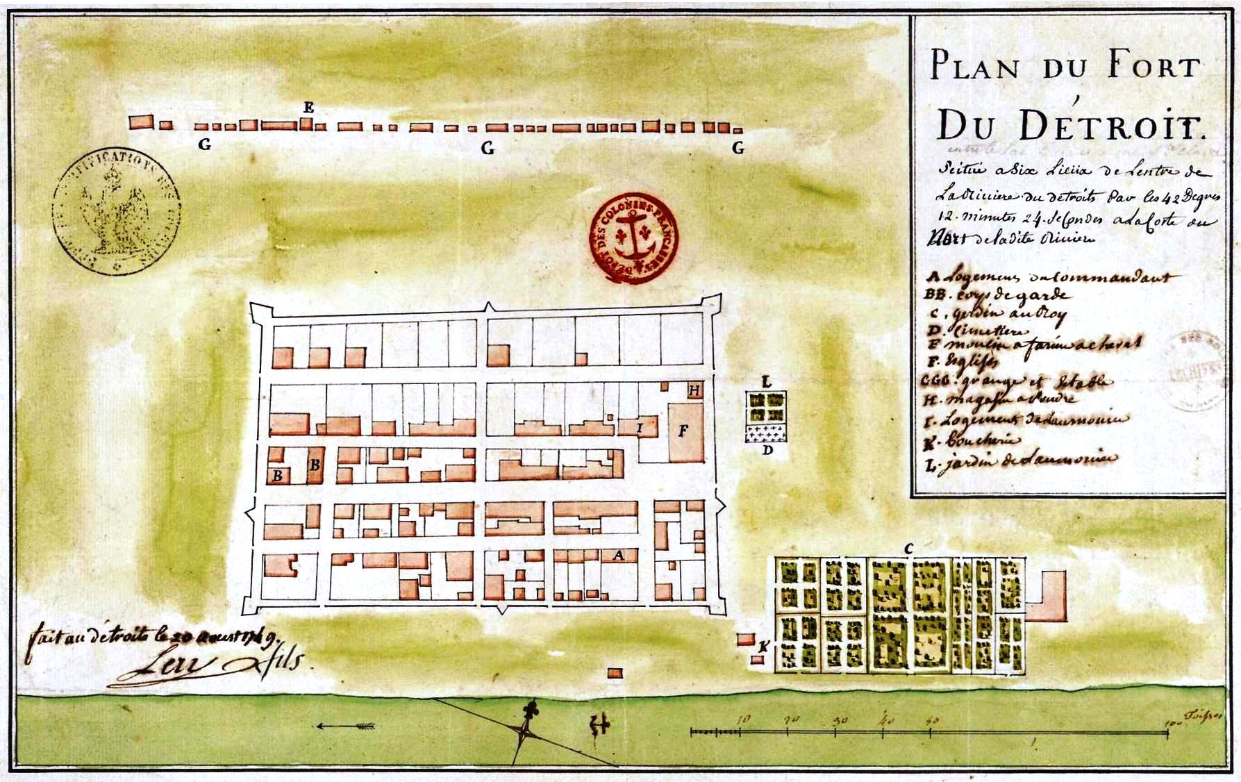 Plan du fort du Détroit